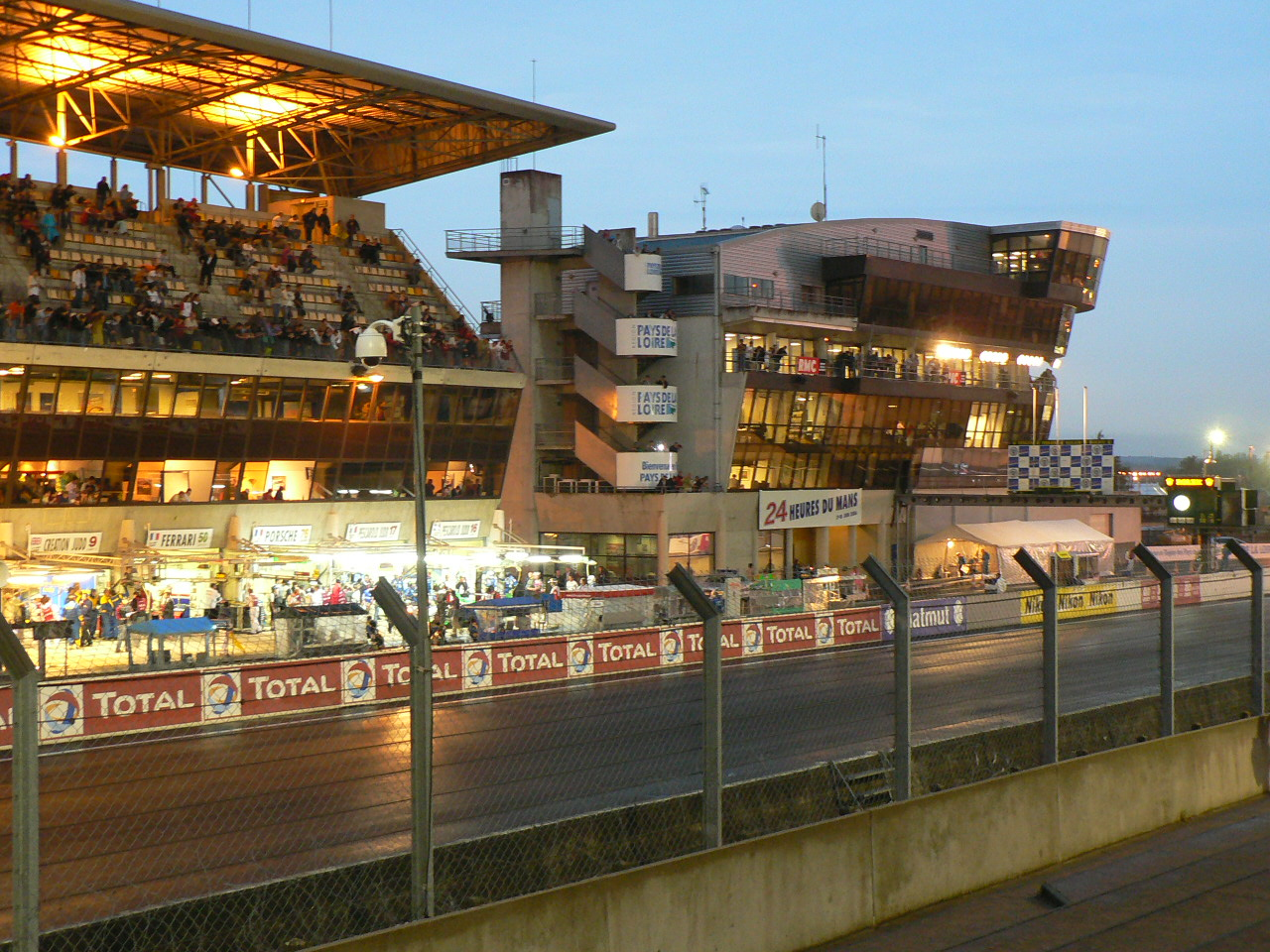 Description: Circuit Bugatti before the 24 heures du mans 2006 - Le Mans (France)